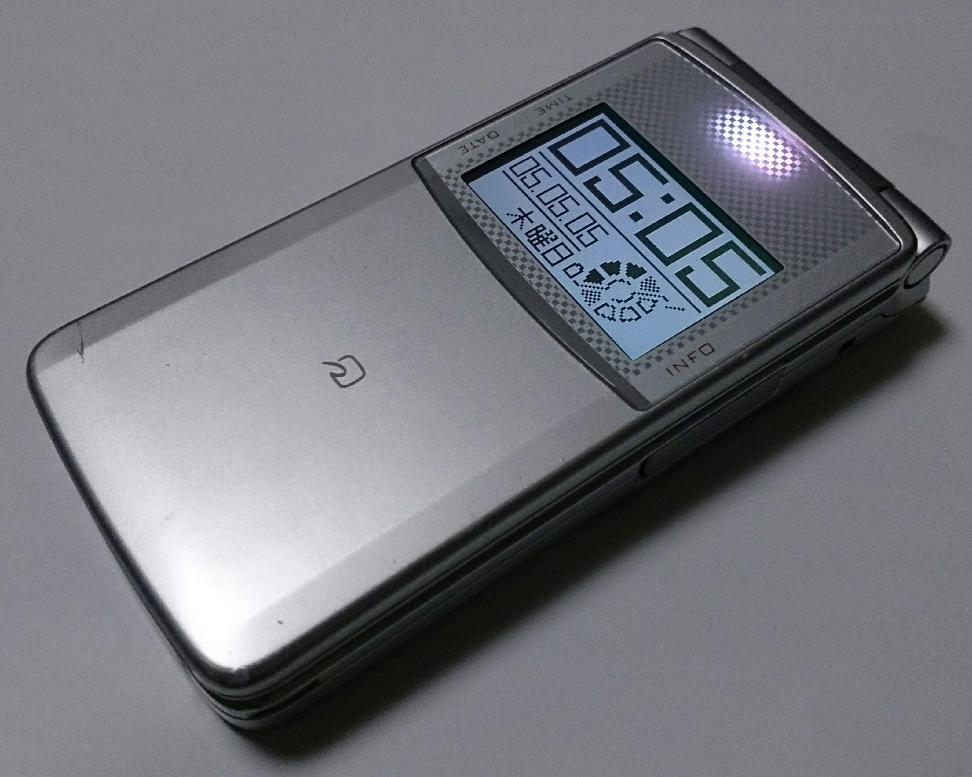 N-05A・蓋を閉じた様子